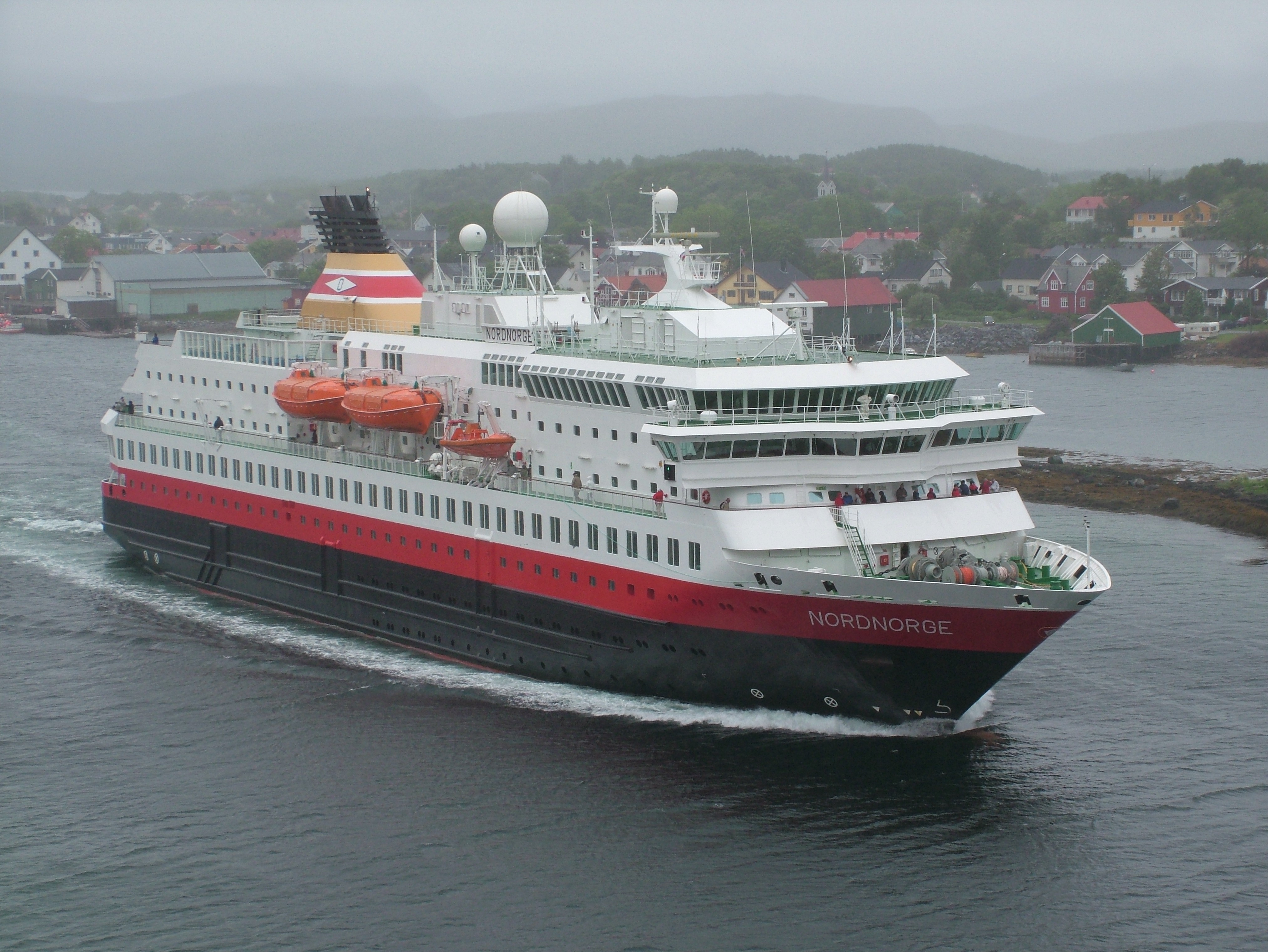 Die MS Nordnorge in Brønnøysund / Norwegen. Der Hintergrund ist verschwommen, da an diesem Tag geregnet hat. MS Nordnorge in Brønnøysund / Norway at an rainy day.